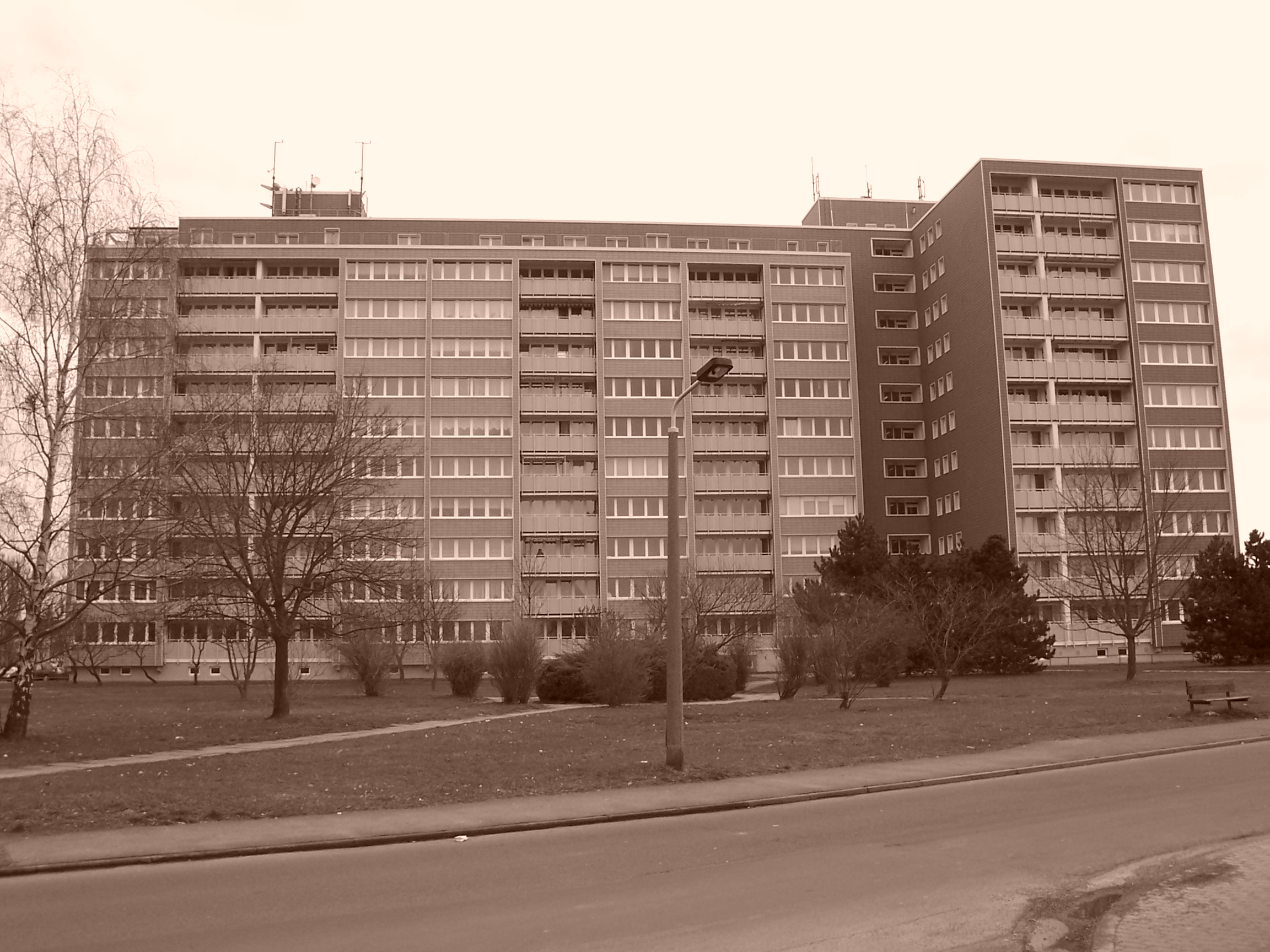 Hochhaus in Eilenburg, Stadtteil Ost, aufgenommen in Sepia